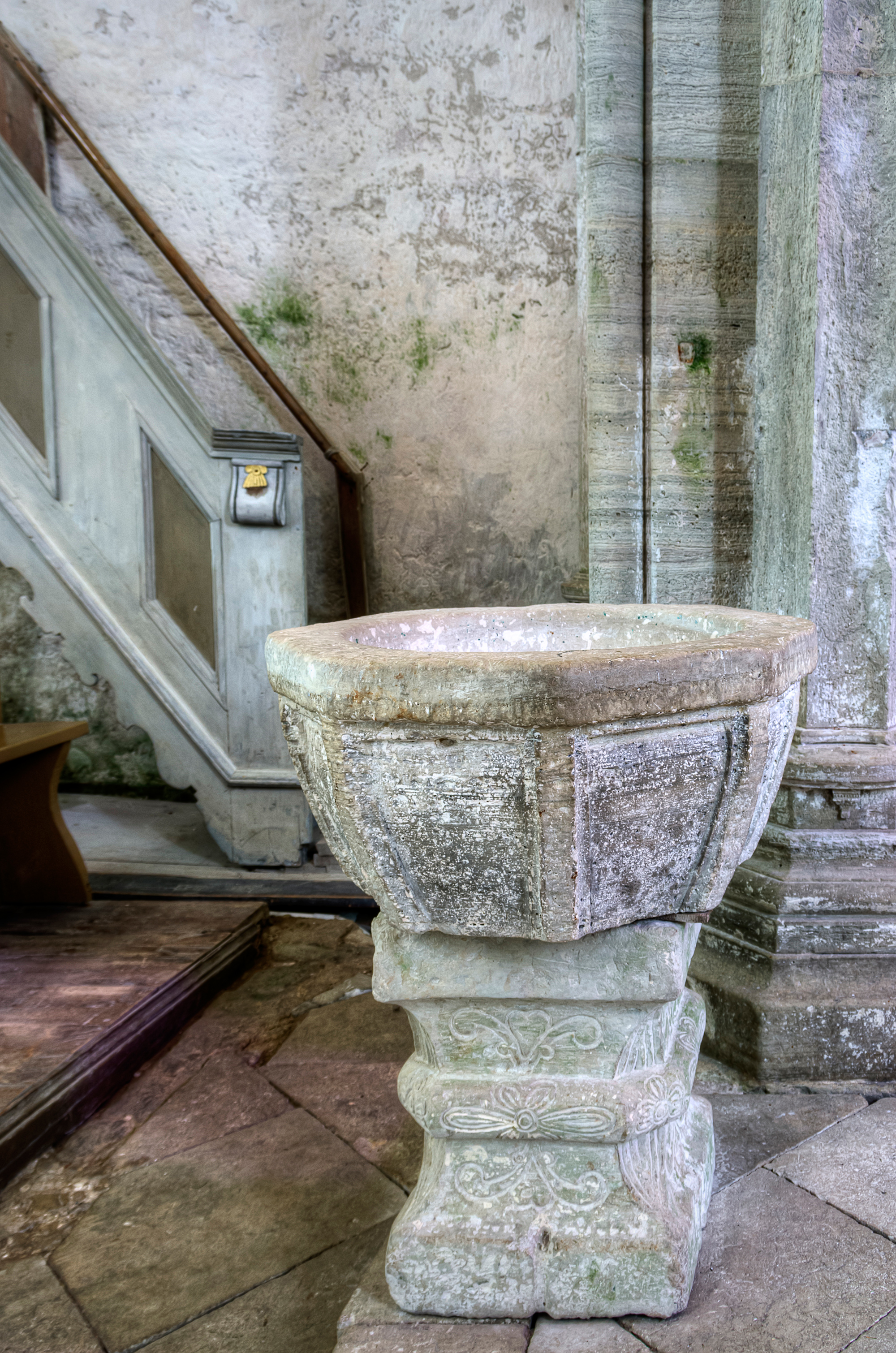 Karja kiriku ristimiskivi (14. saj. I pool).